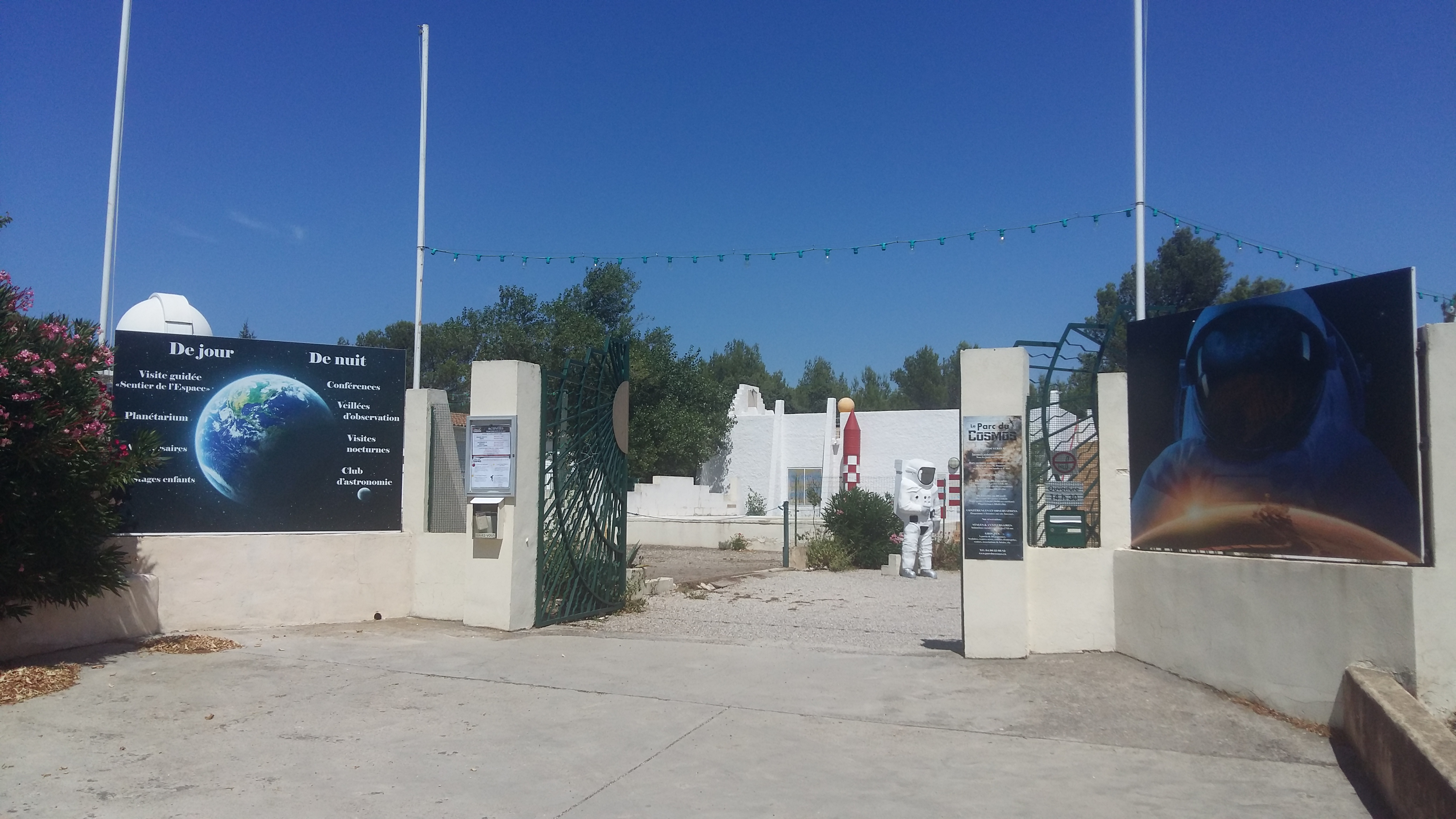 L'entrée, devant le parking gratuit, du Parc du Cosmos. Les Angles, 30133